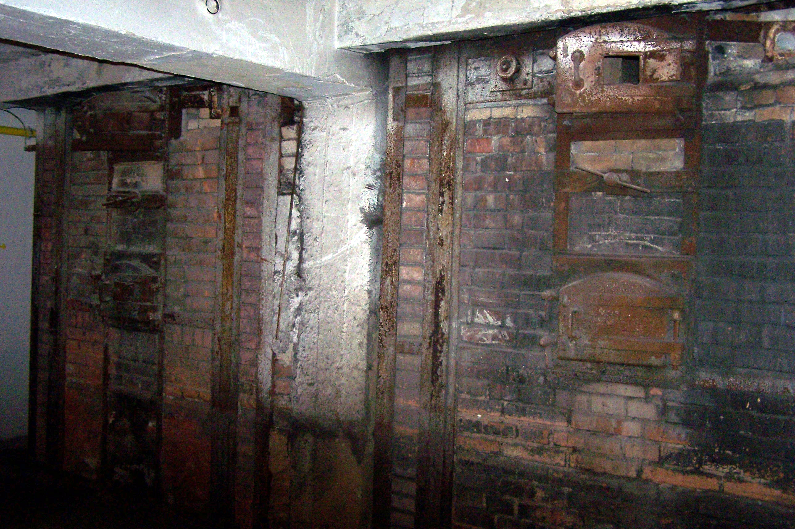 Pardubické krematorium – již nepoužívané pece v prostoru pod hlavní smuteční síní.